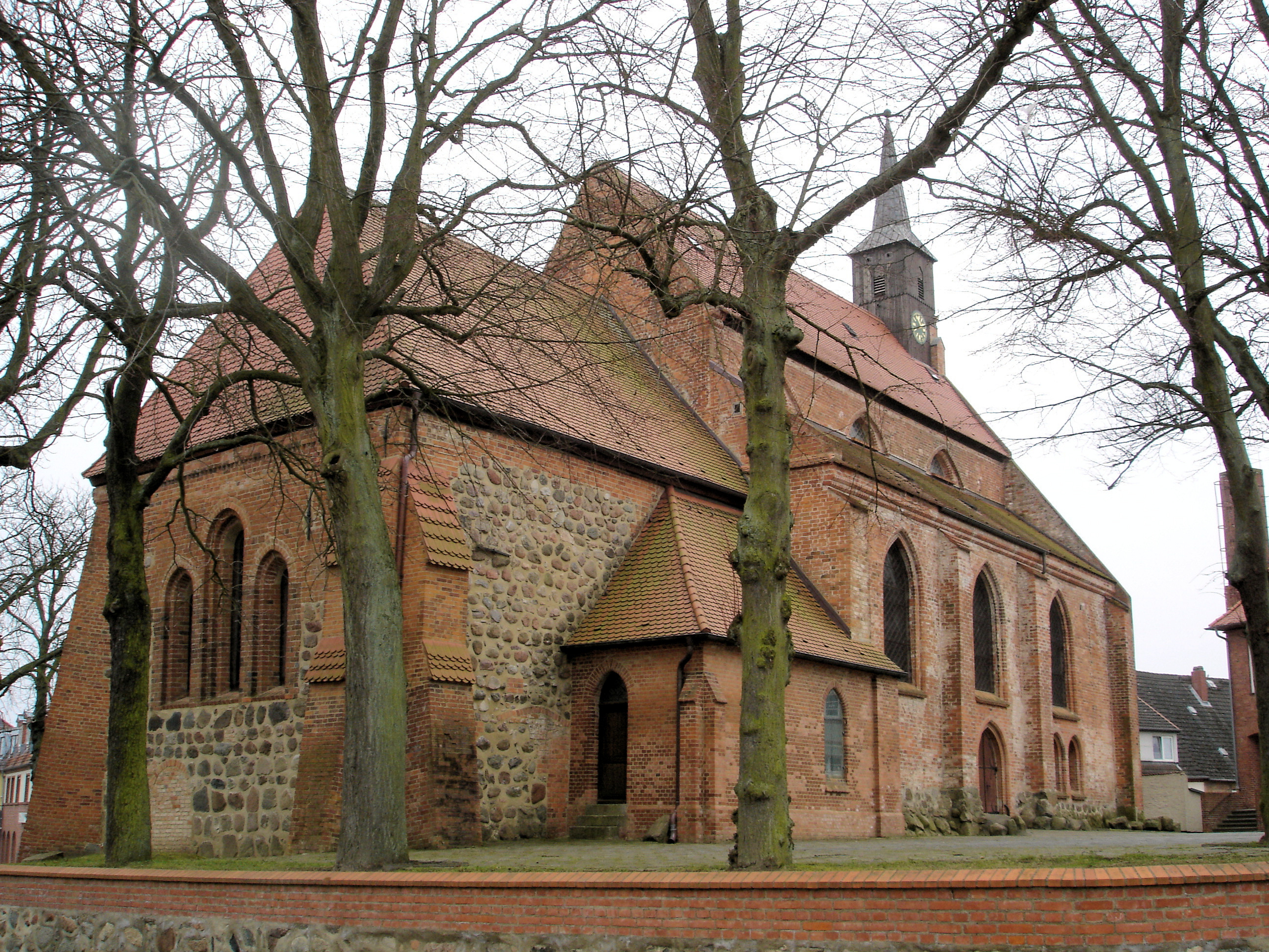 Kirche in Tessin (Mecklenburg) / Church in Tessin (Mecklenburg-Western Pomerania)